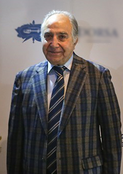 محمدعلی لقاء در چهارمین سال نوای موسیقی ایران ۲ آذر ۱۳۹۷ فرهنگسرای نیاوران